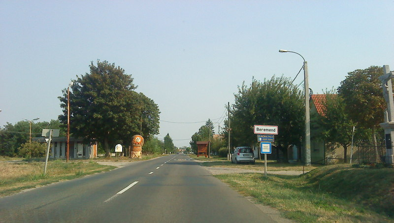 Beremend északi vége